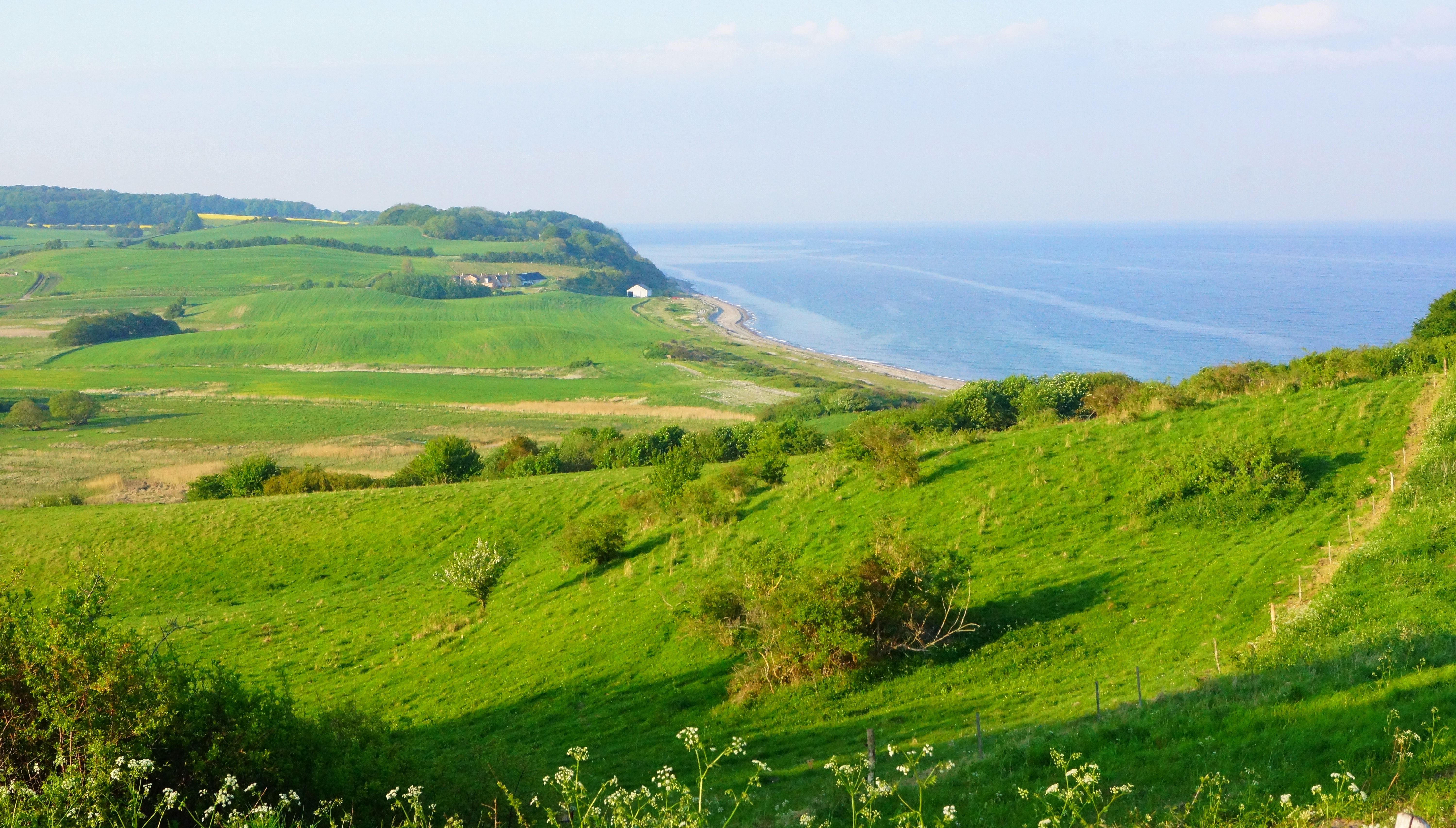 Jernhatten, udsigt nord, mod Rugård Skov